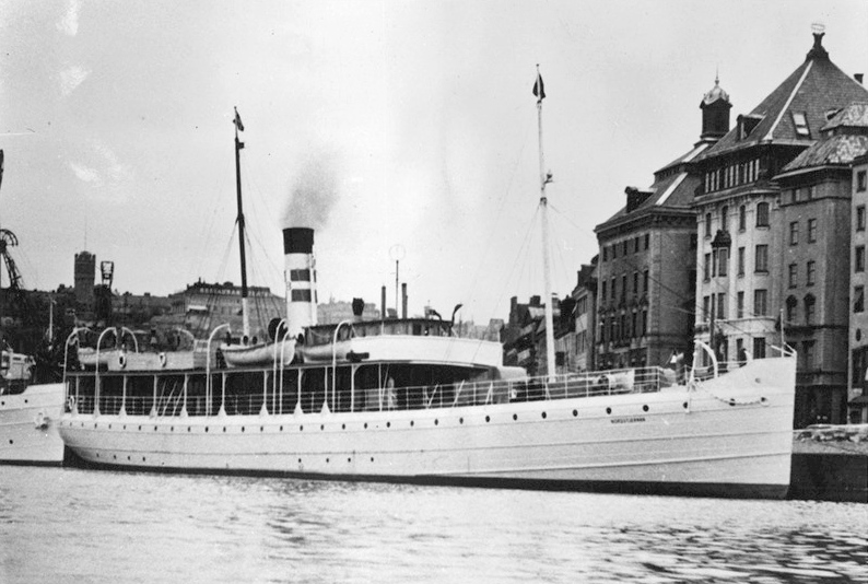 Borekompaniets S/S Nordstjernan